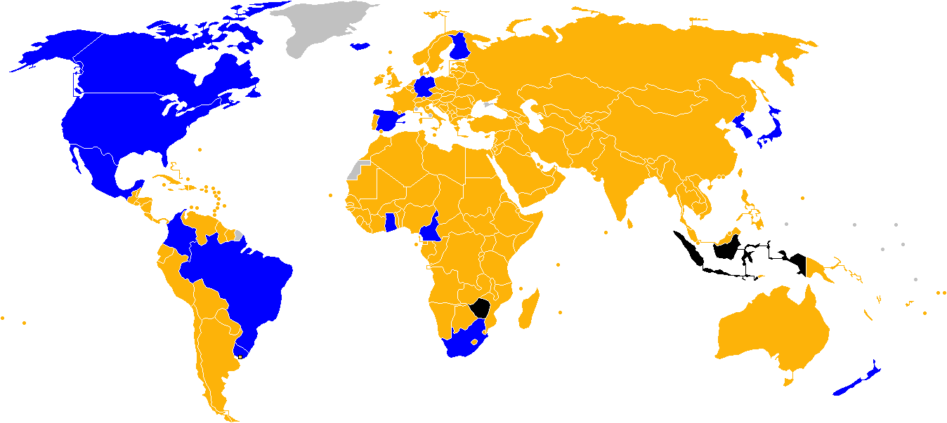 Mapa de clasificación a la Copa mundial de futbol femenino sub-17 de 2018